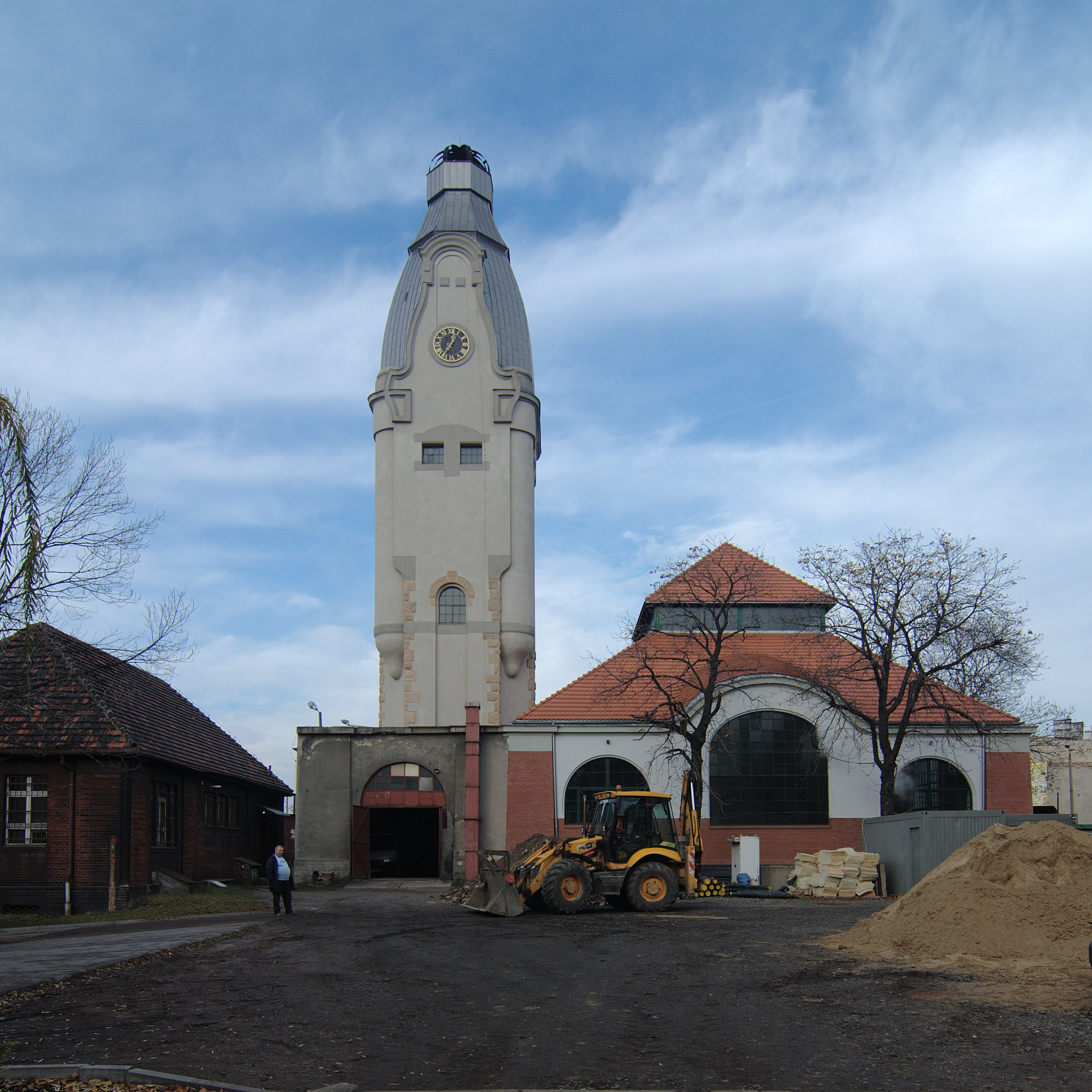 Chorzów. Ulica Strzelców Bytomskich. Wieża ciśnień Szpitala im. dra. Andrzeja Mielęckiego.